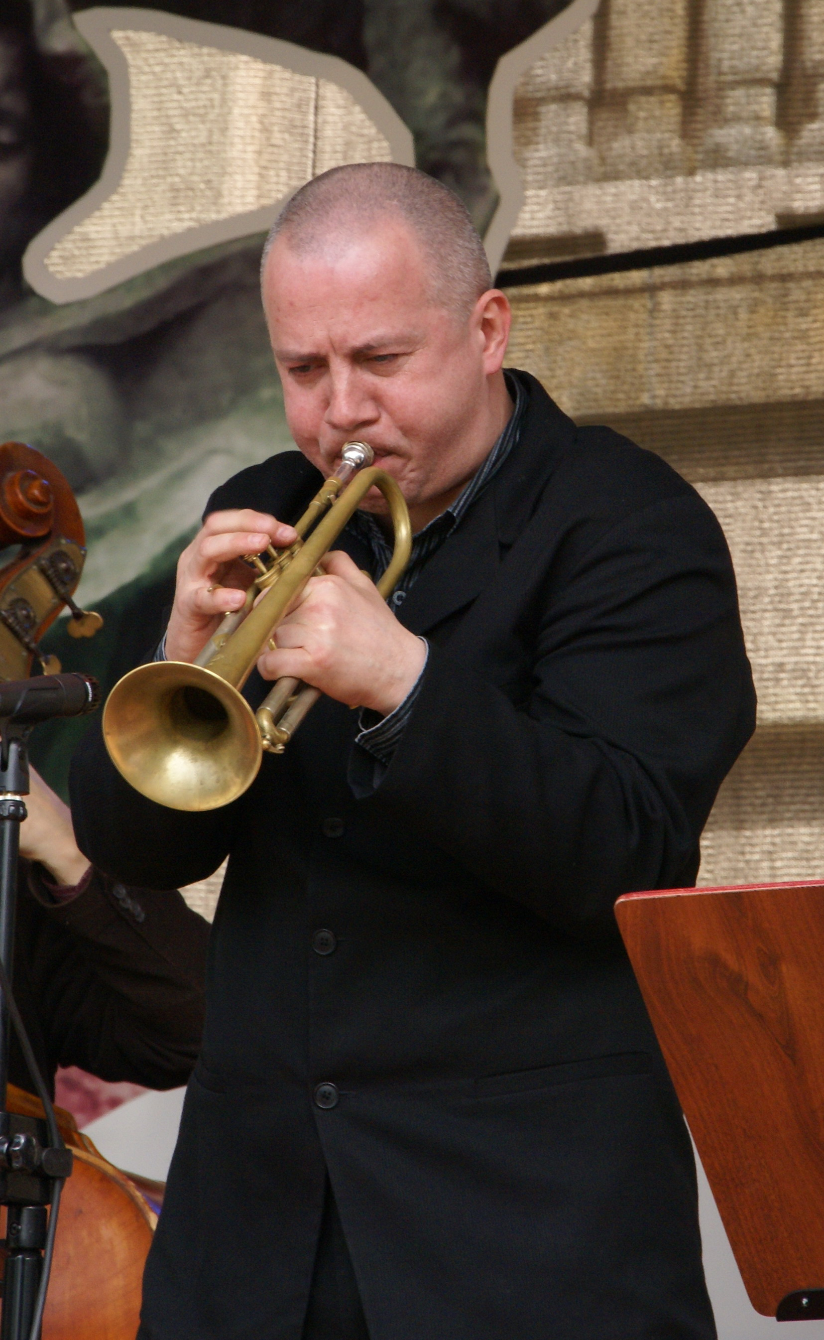 Piotr Wojtasik podczas koncertu "Kalejdoskop Chopinowski", Bydgoszcz 29.05.2010